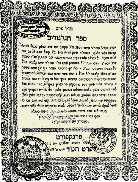 שער הגלגולים דפוס פרנקפורט תמ"ד